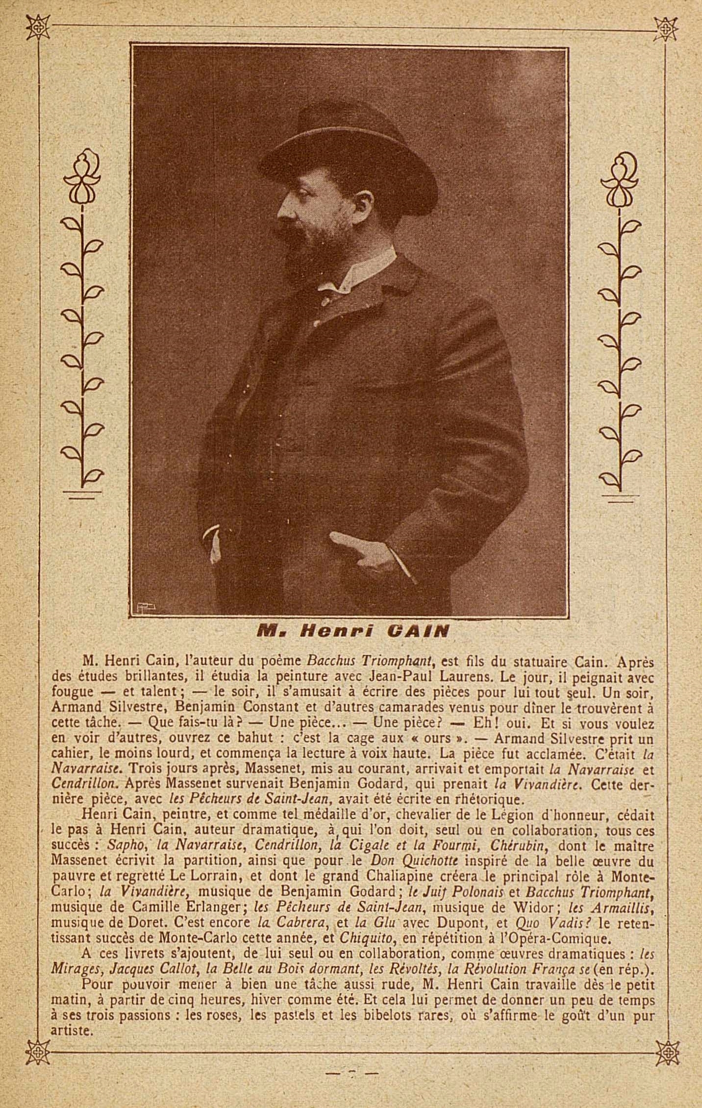 Bordeaux fête-des-vendanges Bacchus triomphant 1909 avec biographie de l'écrivain Henri Cain